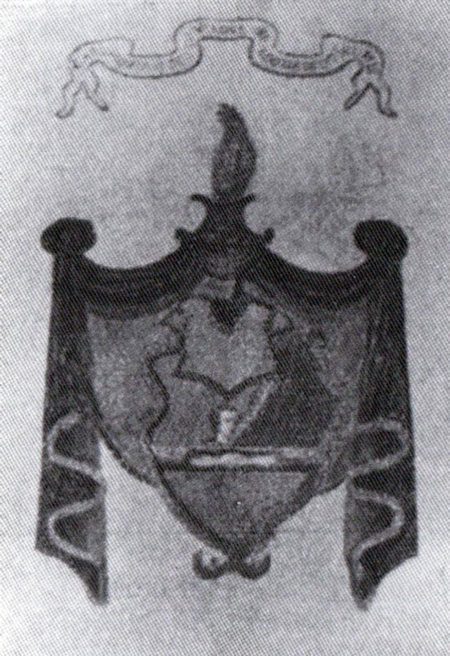 Stema familiei Verona